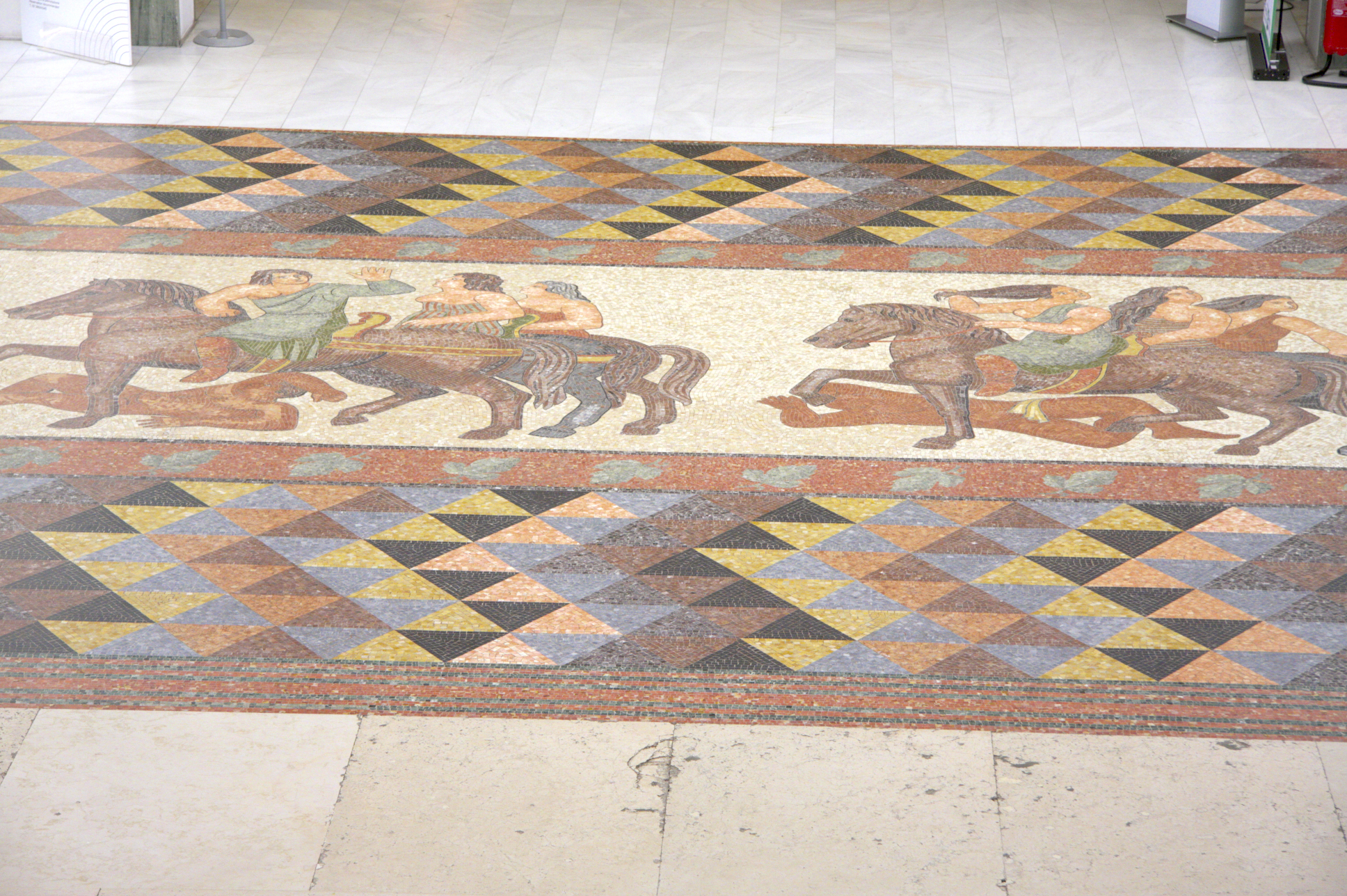 Triennale milano Cavalcata di Amazzoni, mosaico pavimentale Di Leonor Fini e Achille Funi